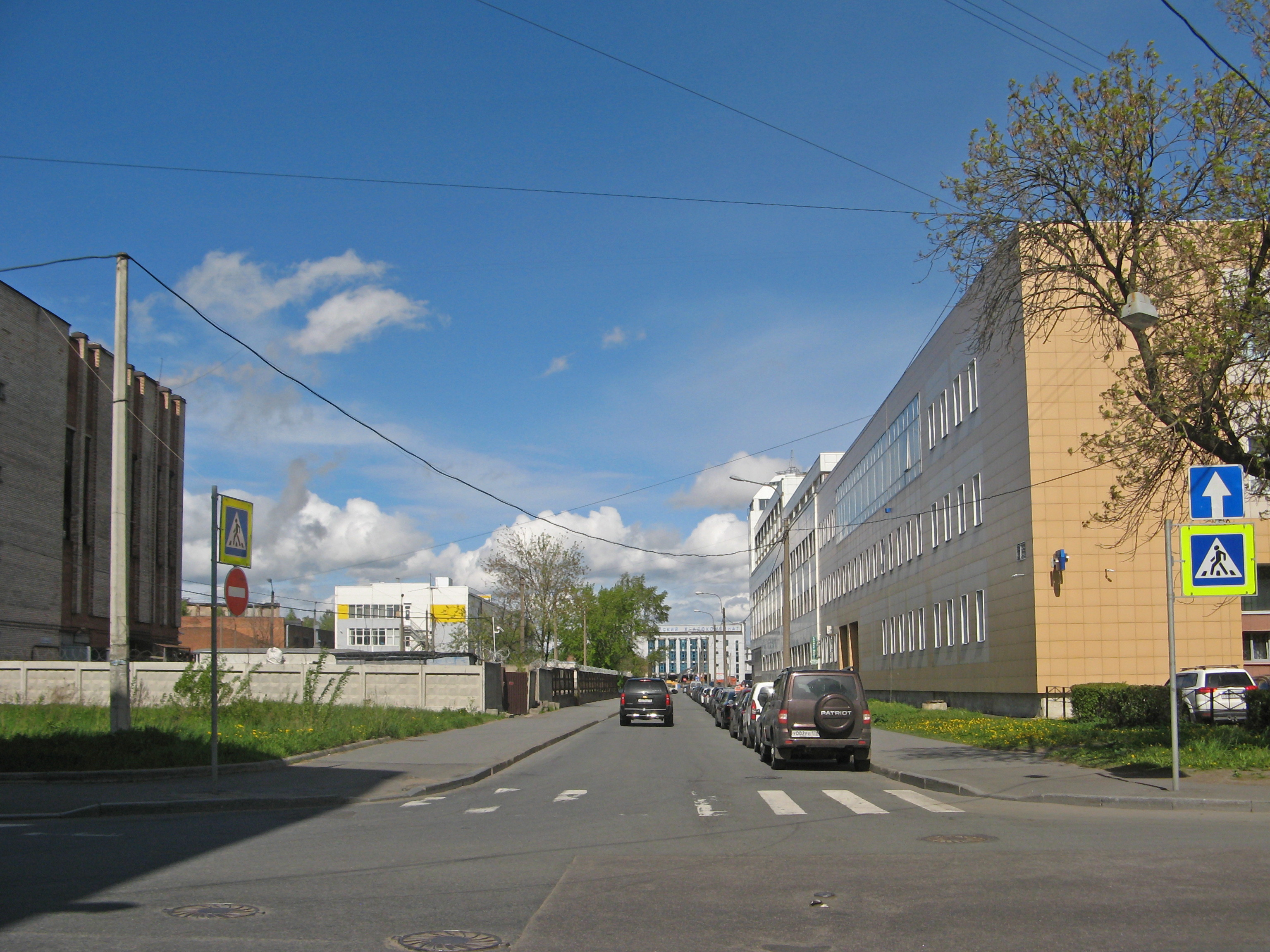 Санкт-Петербург, ул. Метростроевцев